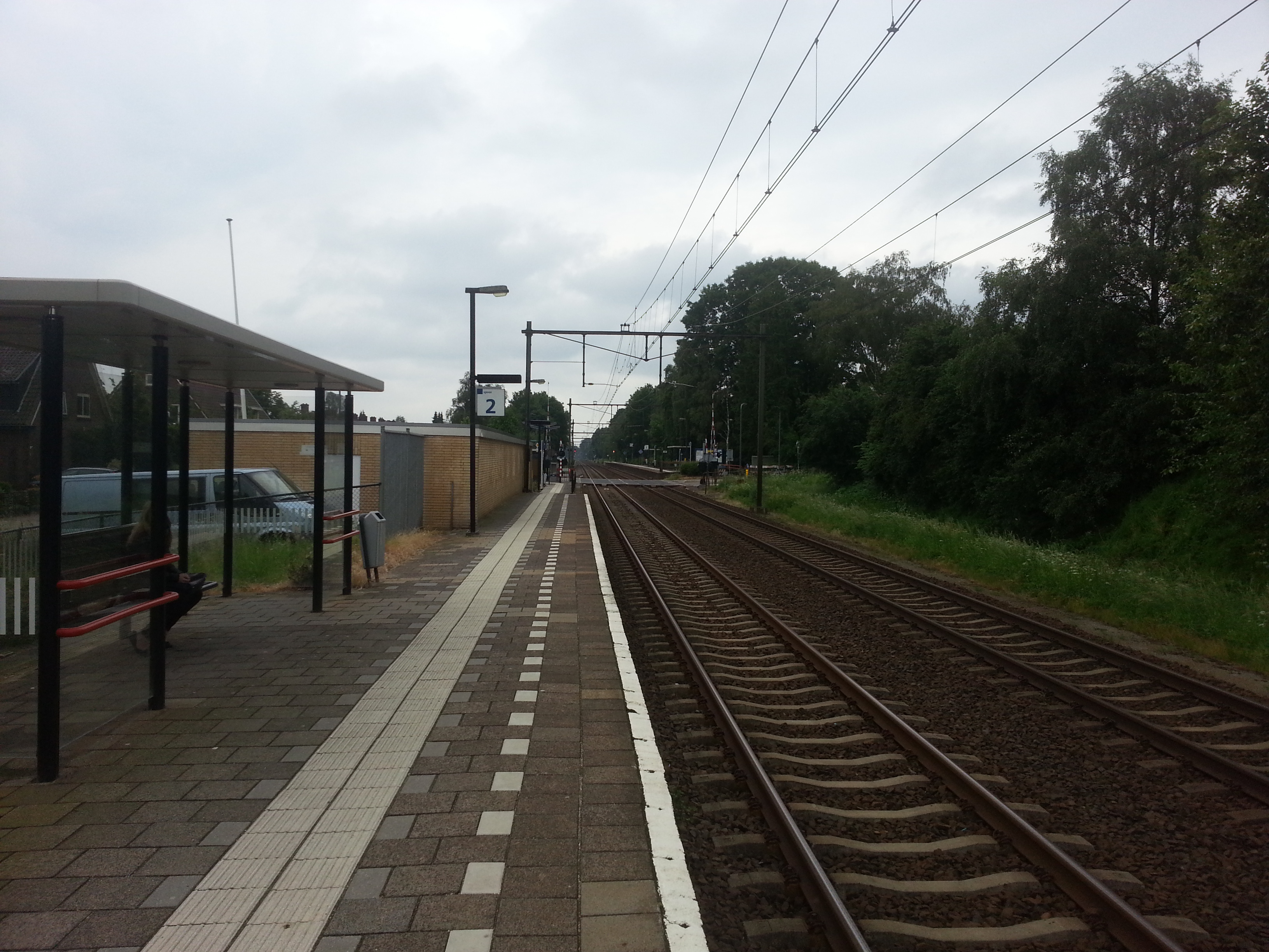 Het perron van station Rheden, gezien in de richting Arnhem.